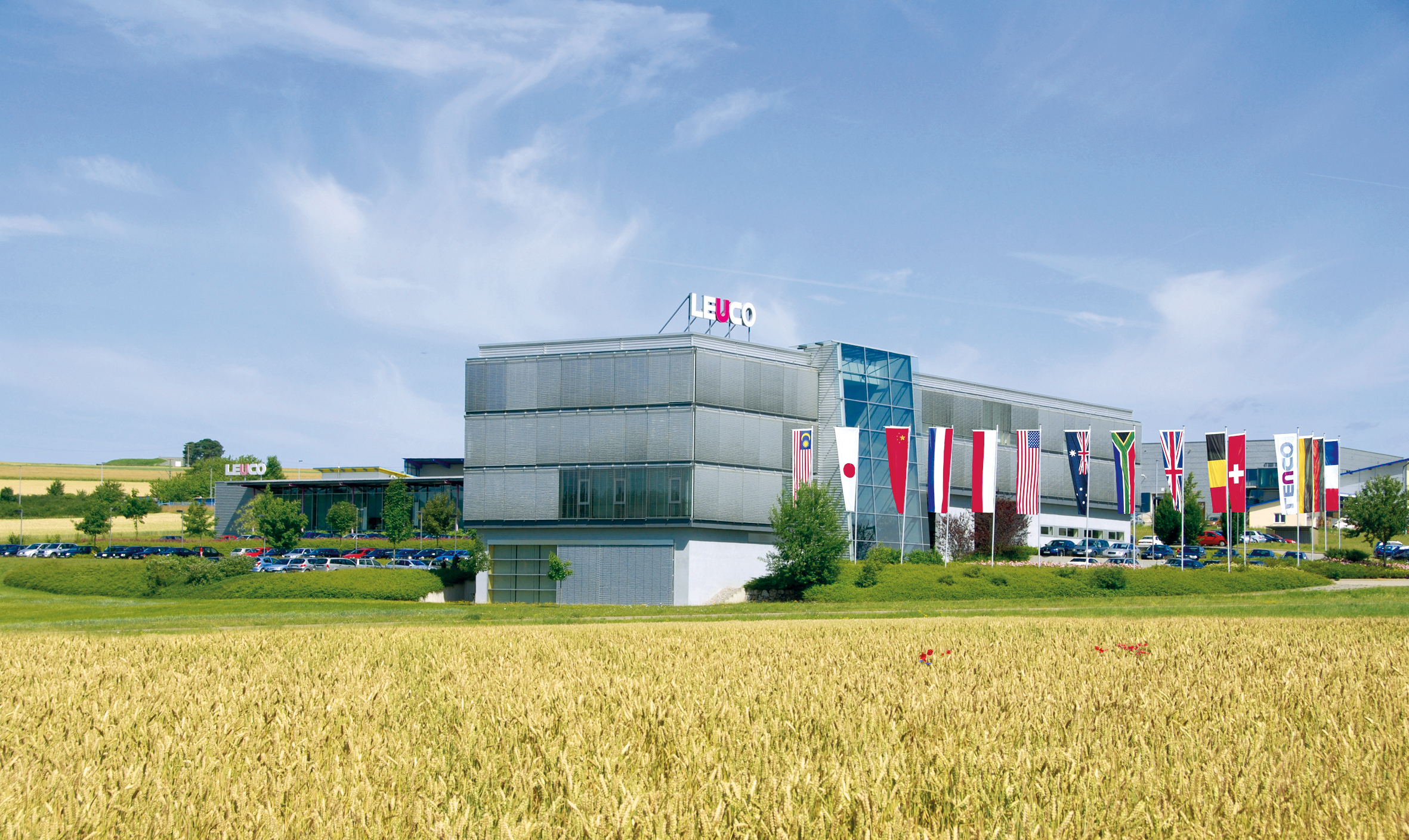 Firmenhauptsitz von LEUCO in Horb am Neckar